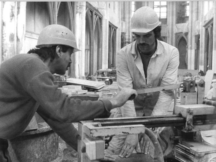 ADN-ZB Ritter 5.3.1987 Berlin: Gert Stopp (r.) und Klaus Höppner aus der Jugendbrigade Fraaß vom Kreisbaubetrieb Glauchau bei Zuschnitt einer Marmorplatte für den Fußboden in der Friedrichwerderschen Kirche. Seit mehr als vier Jahren wirken die Männer aus dem Bezirk Karl-Marx-Stadt um Jugendbrigadier Günter Fraaß an der Restaurierung des Schinkel-Baus in der Berliner Innenstadt mit. Nachdem die Fassaden bereits fertiggestellt sind, wird gegenwärtig der Innenraum der Kirche rekonstruiert. - siehe auch Motiv 18N und 20n